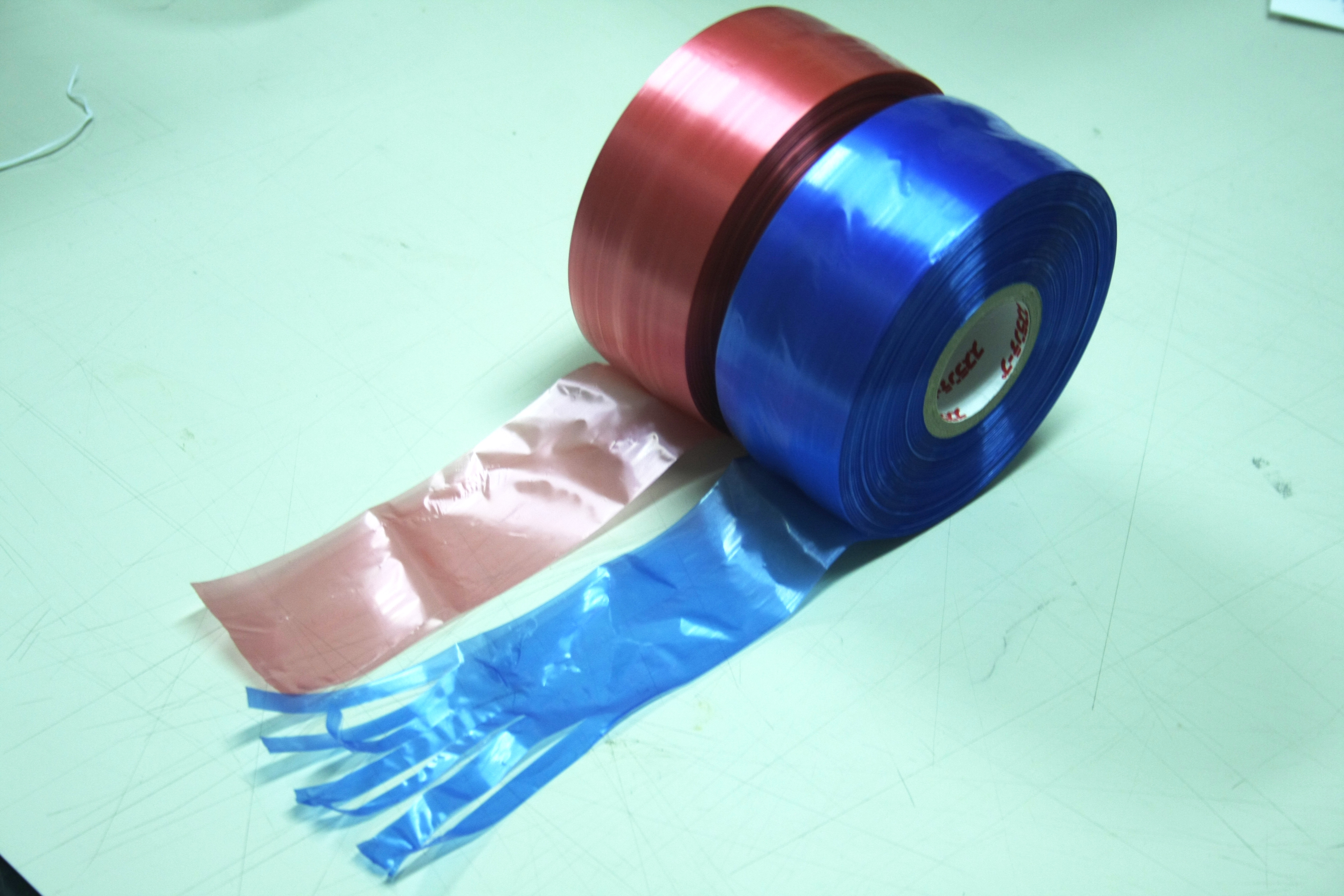 すずらんテープ(赤、青) シーアイ化成社